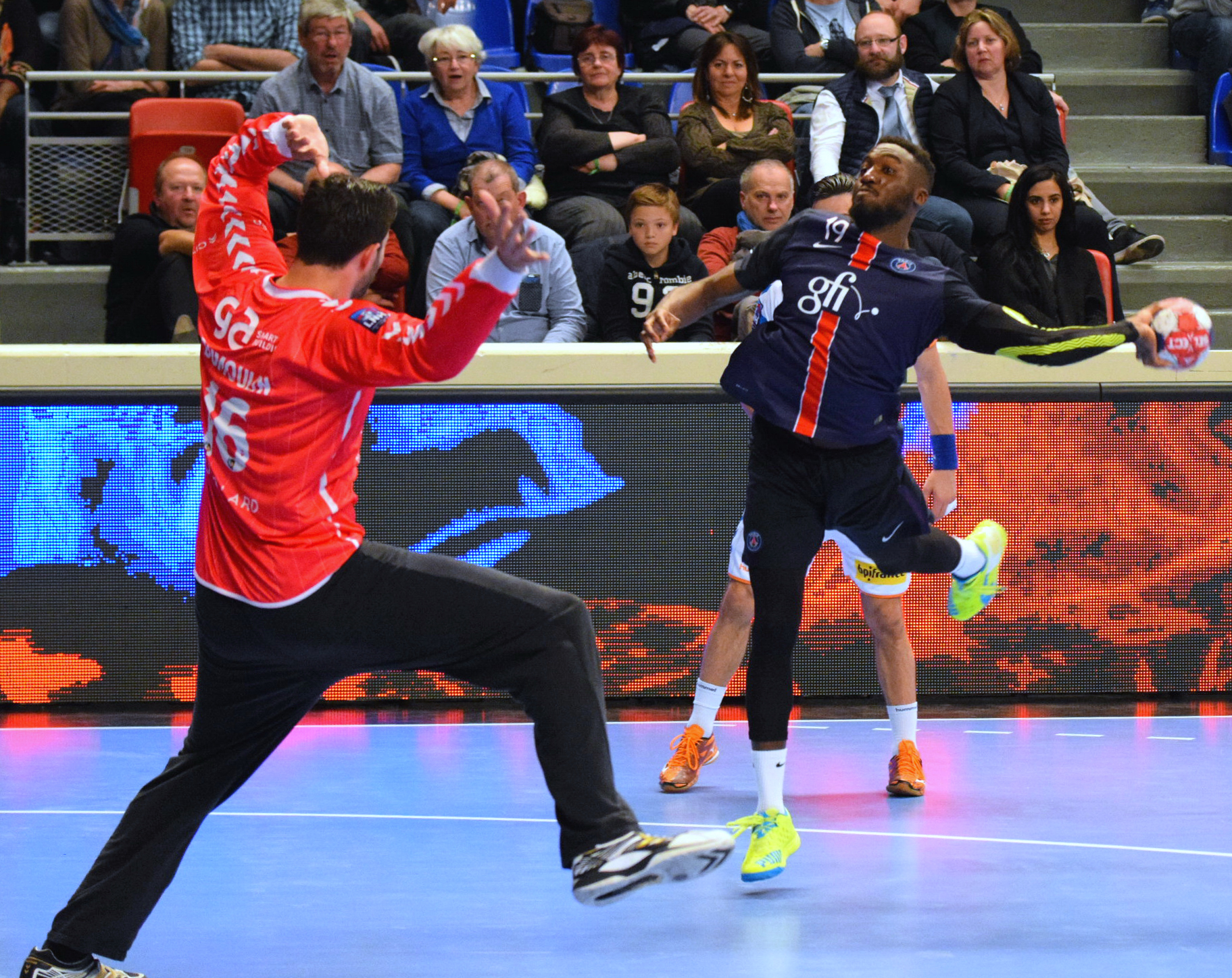 PSG Handball / Toulouse Fenix Handball lors de la 21e journée du championnat de France de handball masculin le 16 avril 2016 au stade Pierre de Coubertin à Paris.